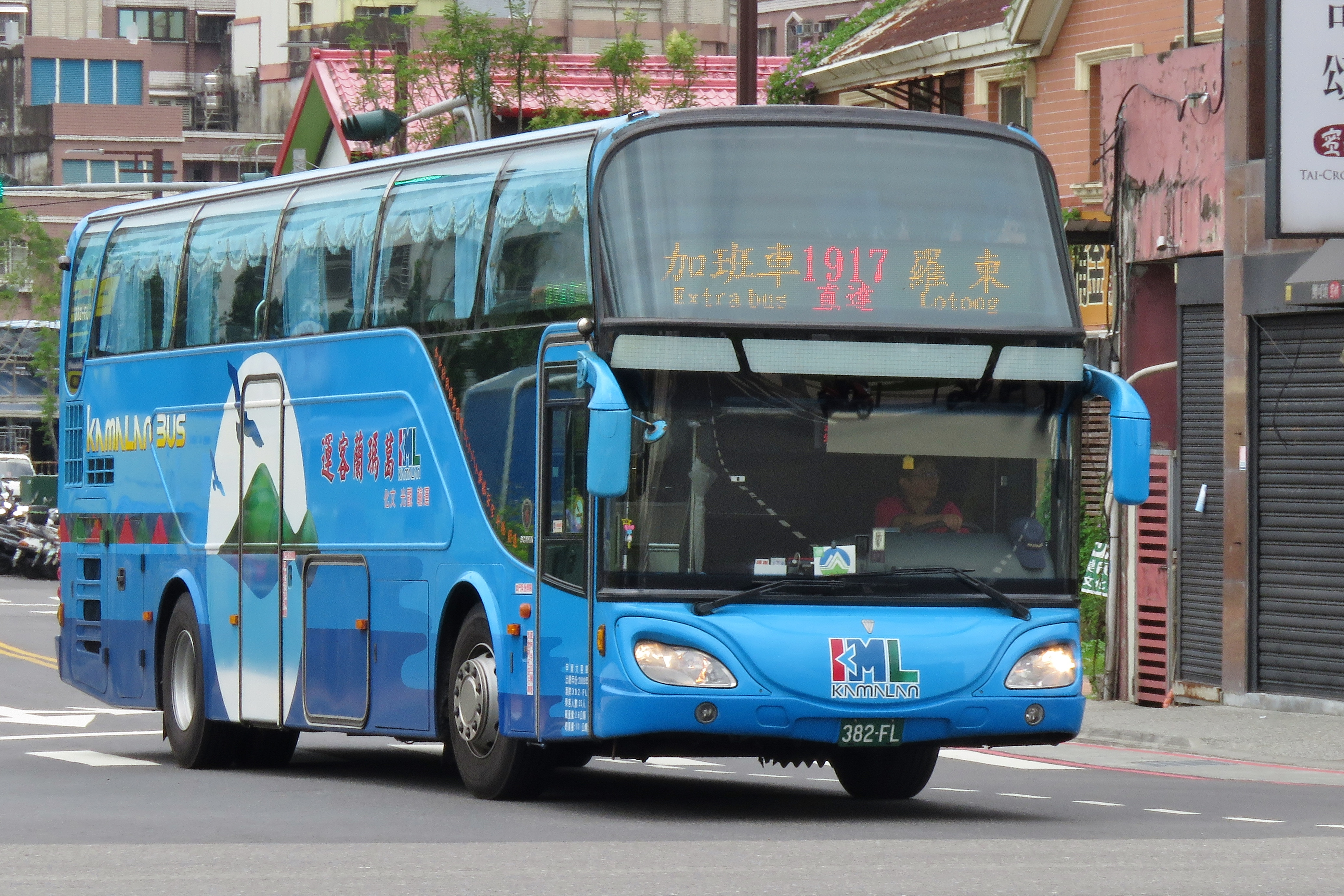 中文（台灣）: 葛瑪蘭客運2009 SCANIA K380IB4X2NB 382-FL 1917路 羅東→板橋